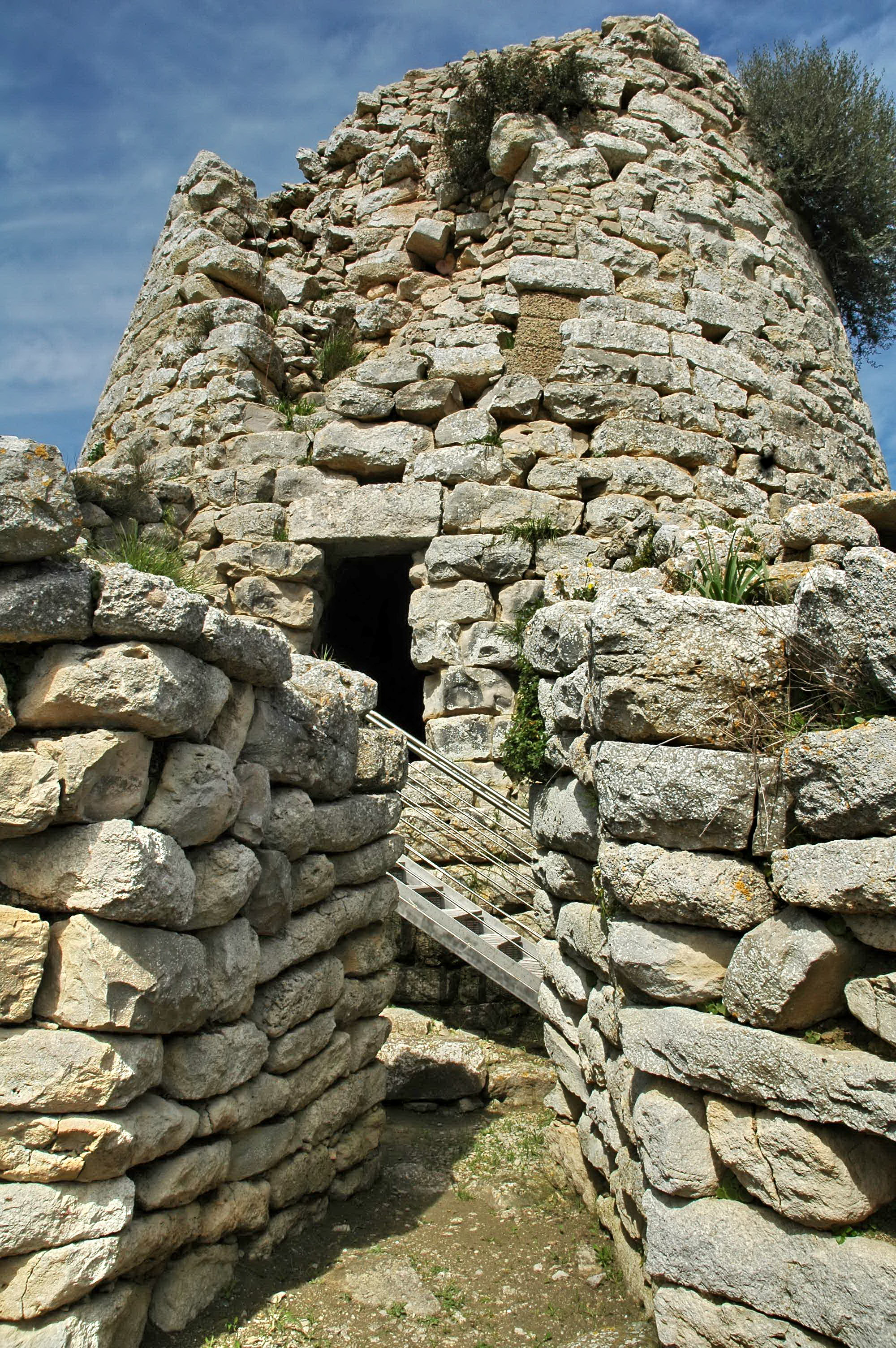 Nuraghe Is Paras - MIBAC This is a photo of a monument which is part of cultural heritage of Italy.